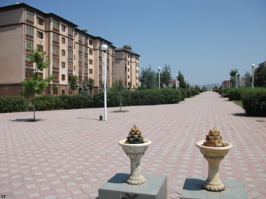 Улица Н. С. Хрущёва в Магасе